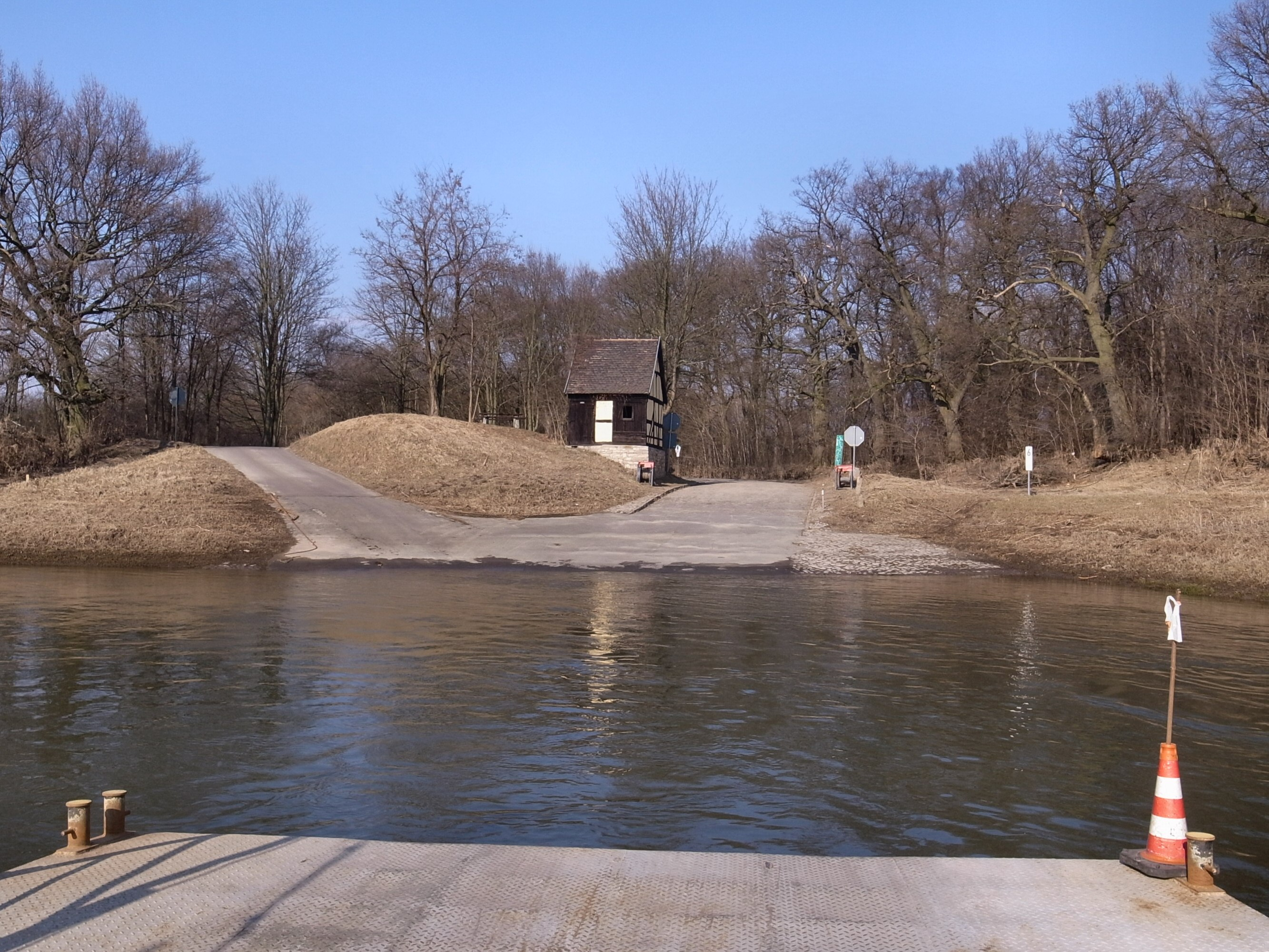 Barby (Elbe), Ortsteil Werkleitz, Fährwindenhaus an der Saalefähre Groß Rosenburg. (Kulturdenkmal im Denkmalverzeichniss Sachsen-Anhalt, Erfassungsnummer: 094 60504 000 000 000 000 [1])